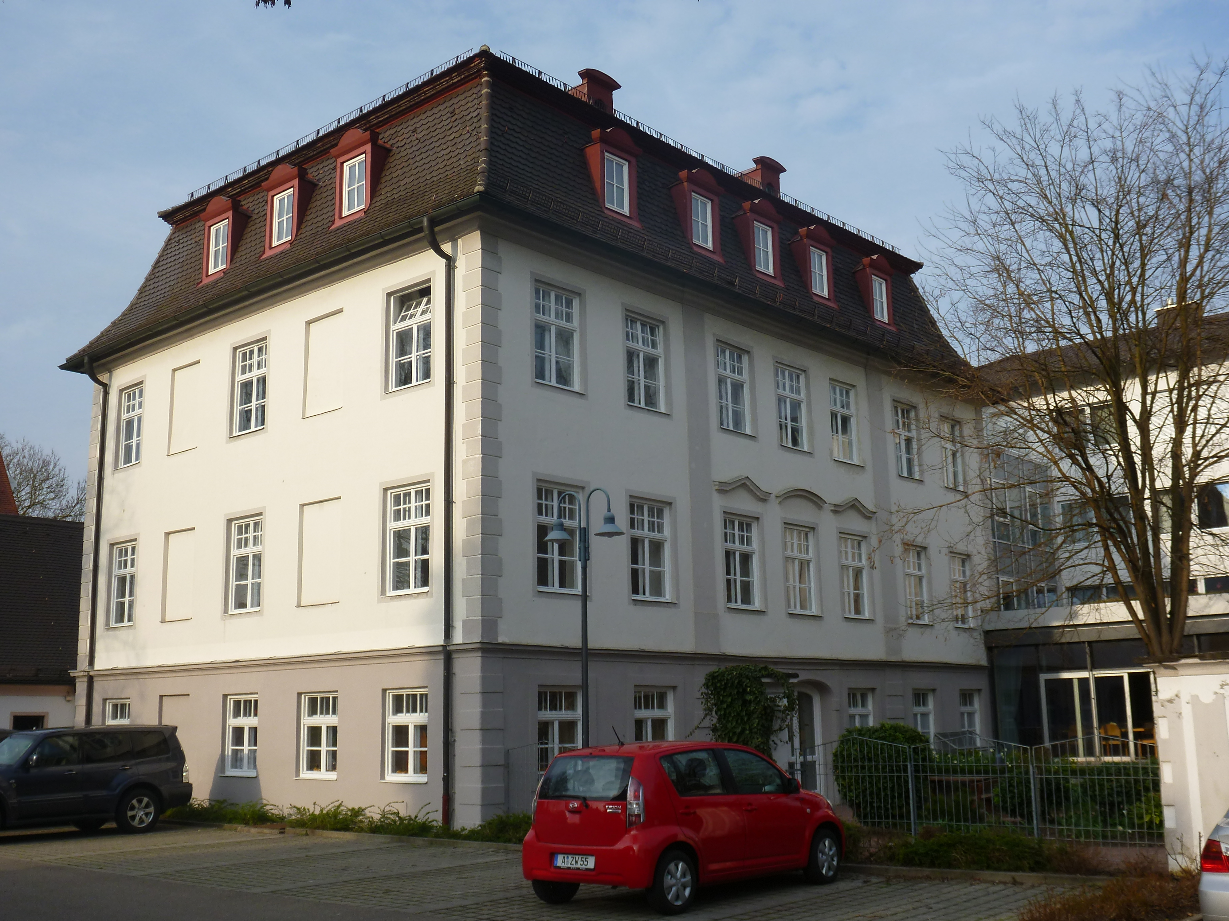 Ehem. Schloss, dreigeschossig mit Mansardwalmdach, um 1770